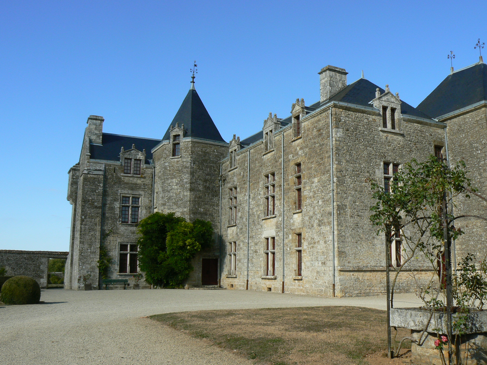 Château de Reigné, (Inscrit, 1990) .